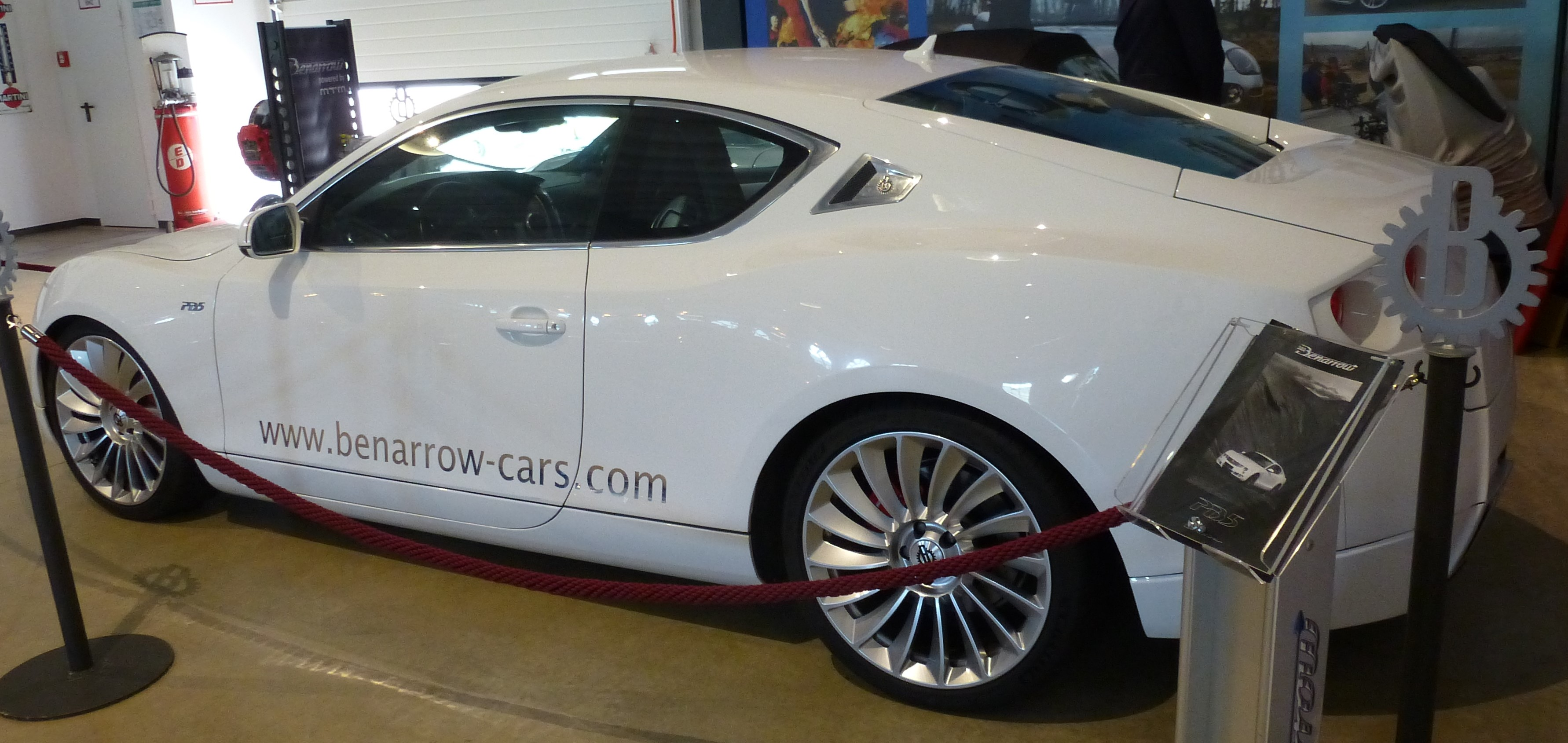 Benarrow PB 5